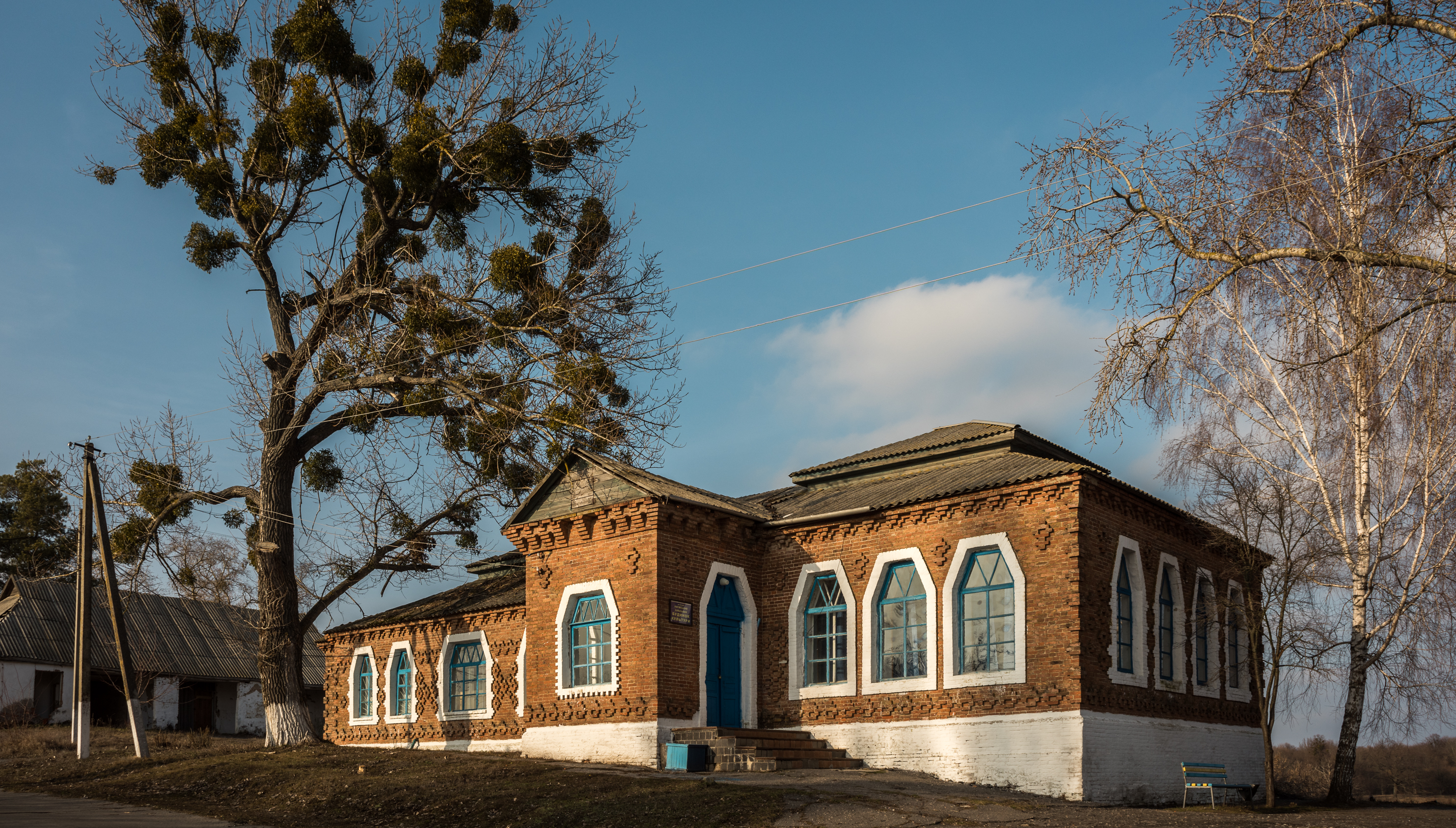 Школа земська однокомплектна, село Риги, вул. Миру, 54. Архітектор Опанас Сластіон.